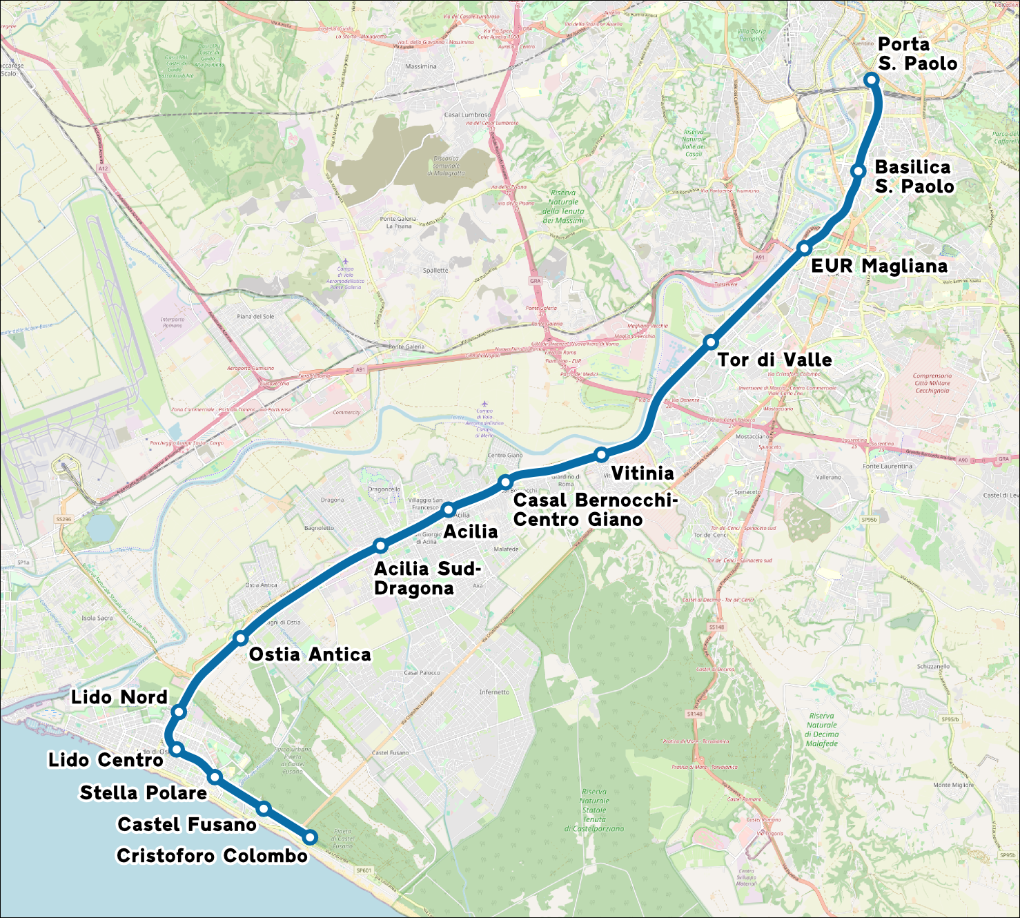 Mappa della ferrovia Roma-Lido